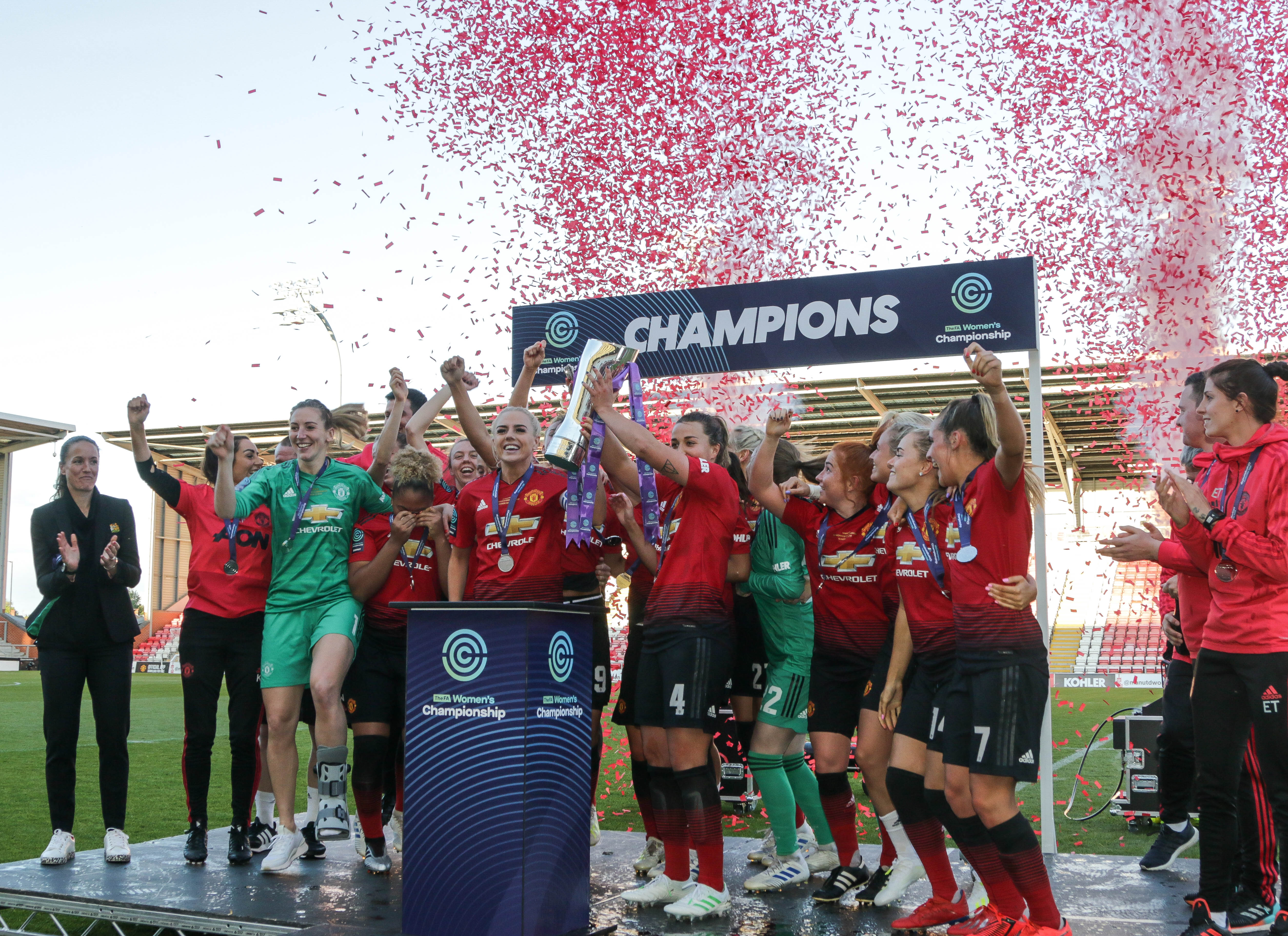 Man Utd Women 5 Lewes FC Women 0 11 05 2019-654.jpg